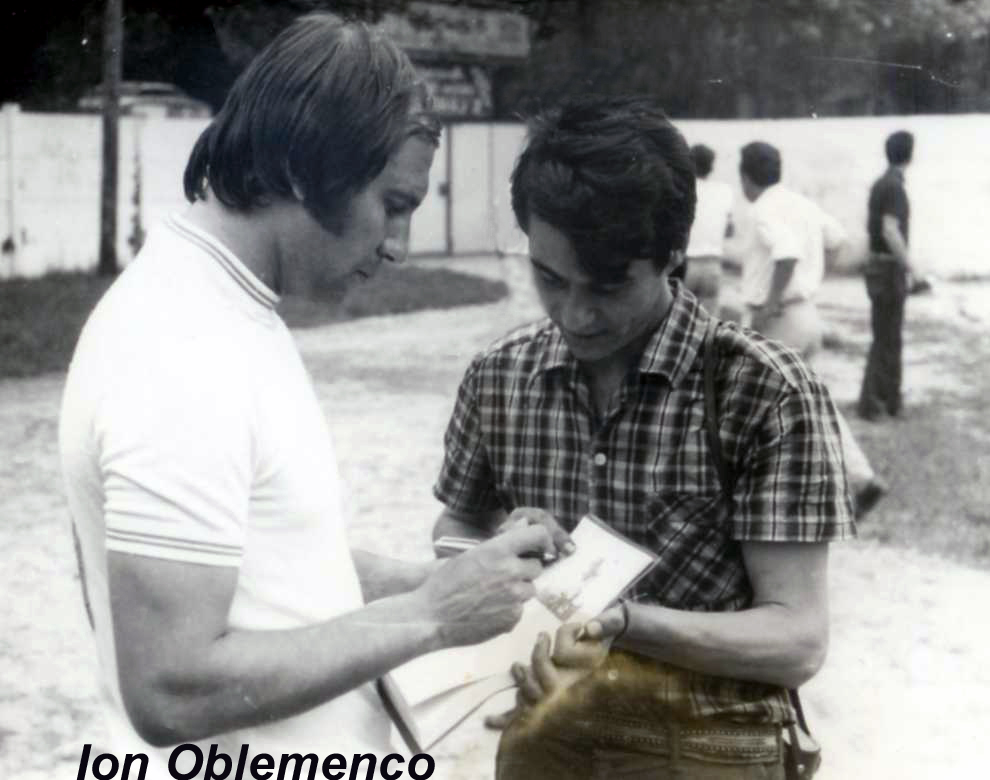 Ion Oblemenco sur le stade central Bals